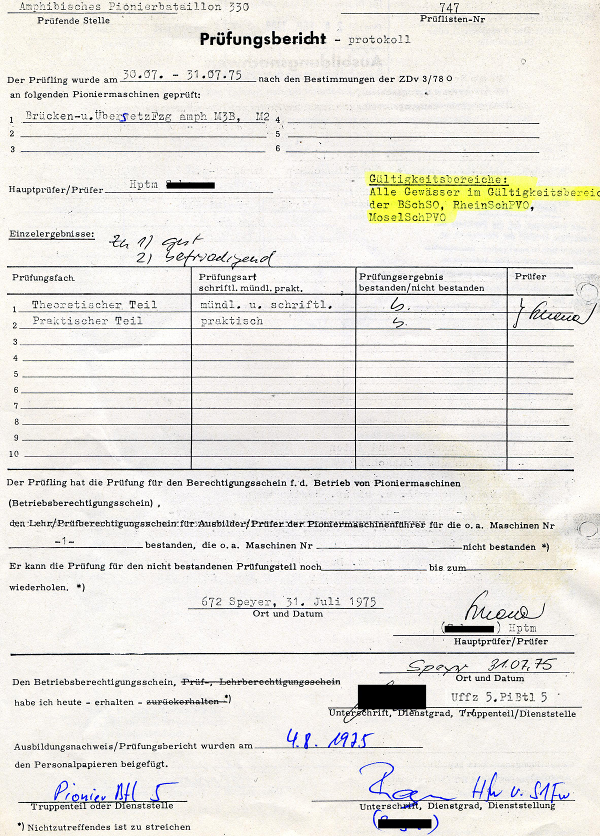 Prüfungsnachweis